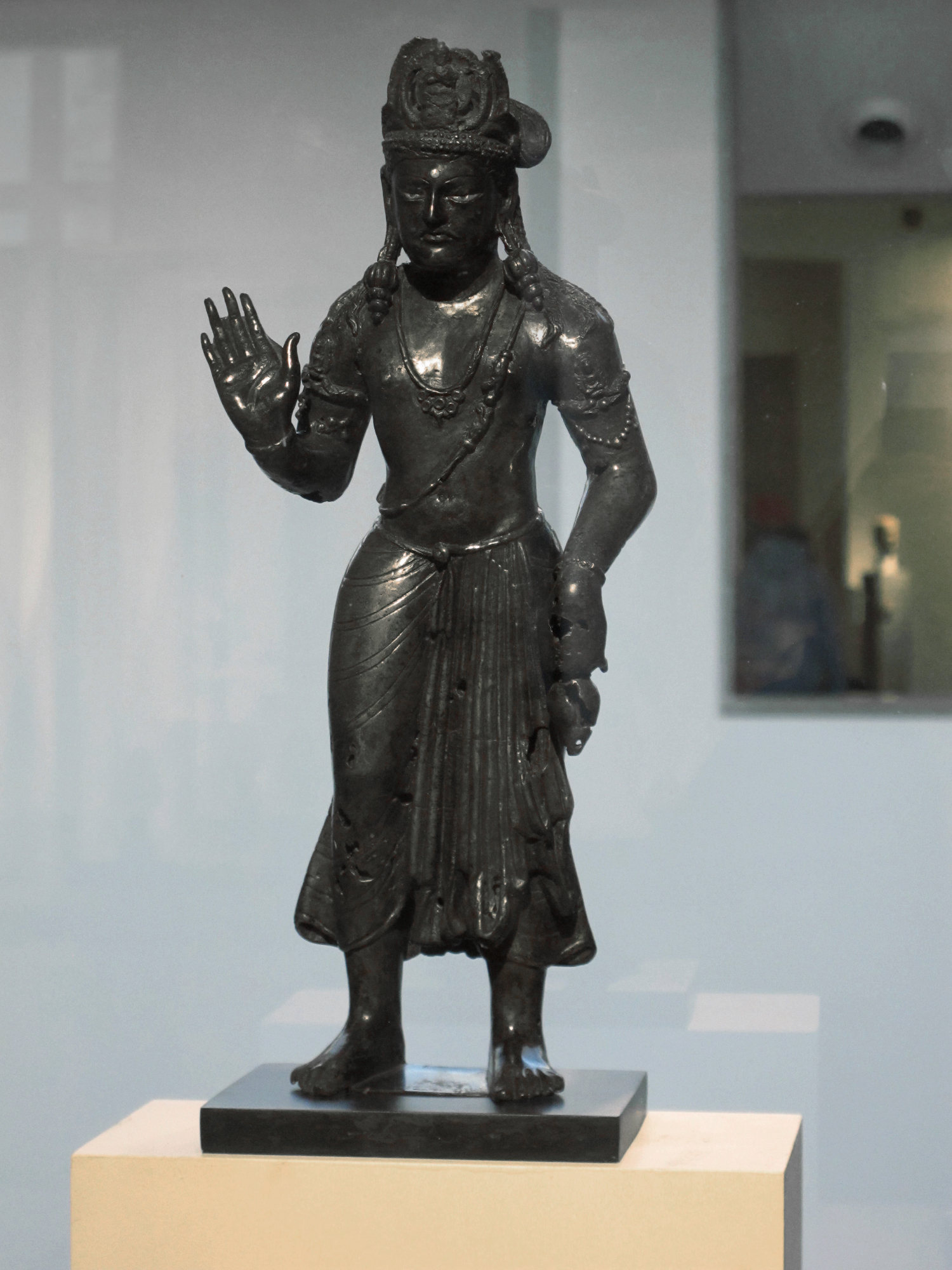 Bodhisattva Avalokitesvara. Gandhara (actuel Pakistan). IIIe - IVe siècle (voire plutôt IVe - Ve siècle). Bronze, incrustations d'argent, H. 37cm. Don société Vinci. MA 12128. Musée national des arts asiatiques - Guimet Photographie retouchée / De l'Inde au Japon : 10 ans d'acquisitions au Musée Guimet. 1996-2006, Réunion des musées nationaux et Musée des arts asiatiques Guimet, 2006. ISBN 978-2-7118-5369-4. Page 40.